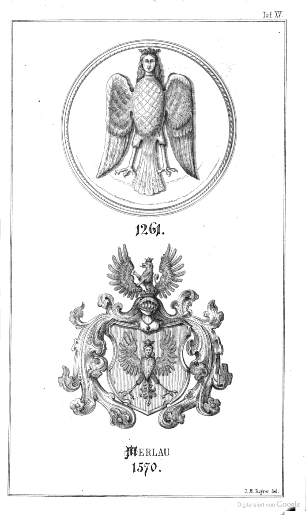 Verschiedene Wappen bei Schloss Merlau